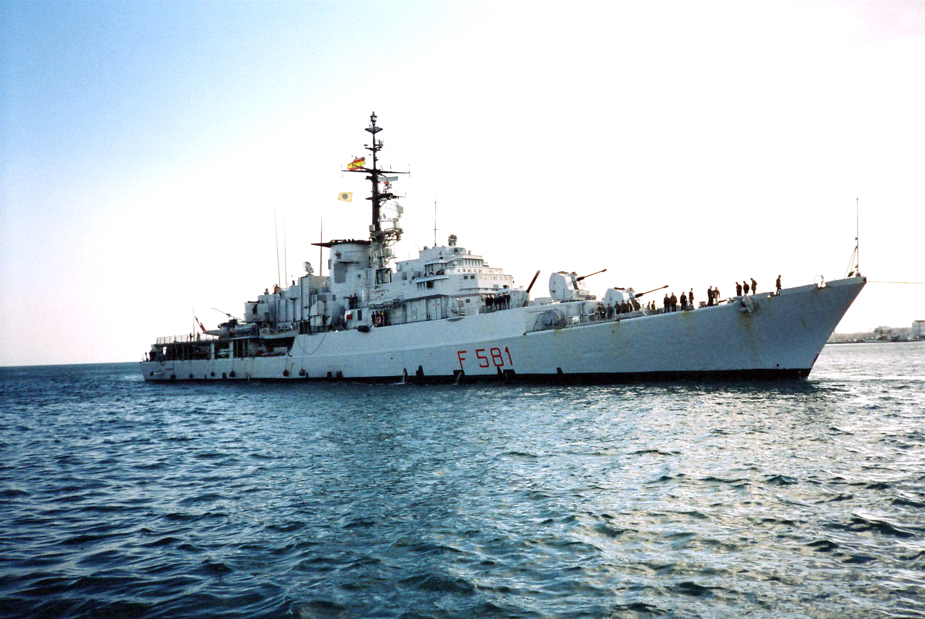 La fregata Carabiniere a Málaga, prima della trasformazione a Nave Esperienze